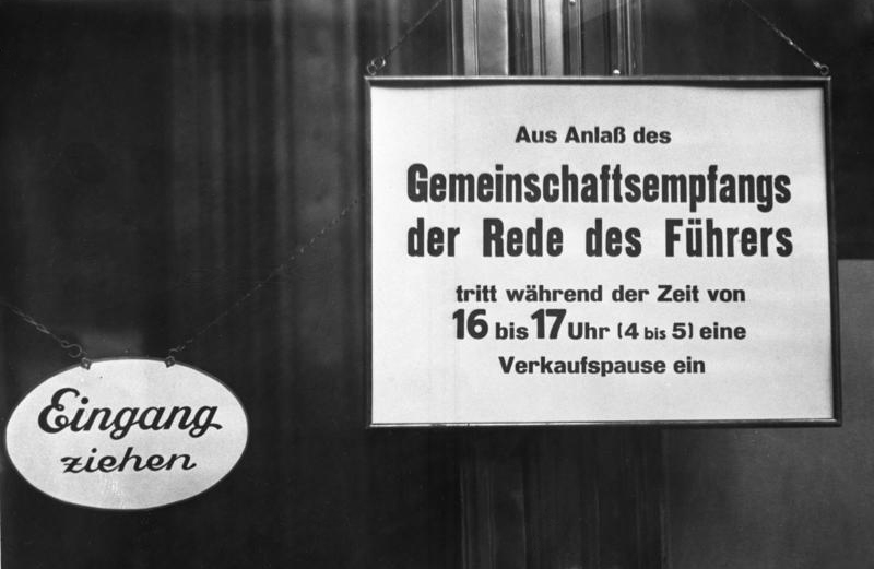 Gemeinschaftsempfang (Wahlrede)